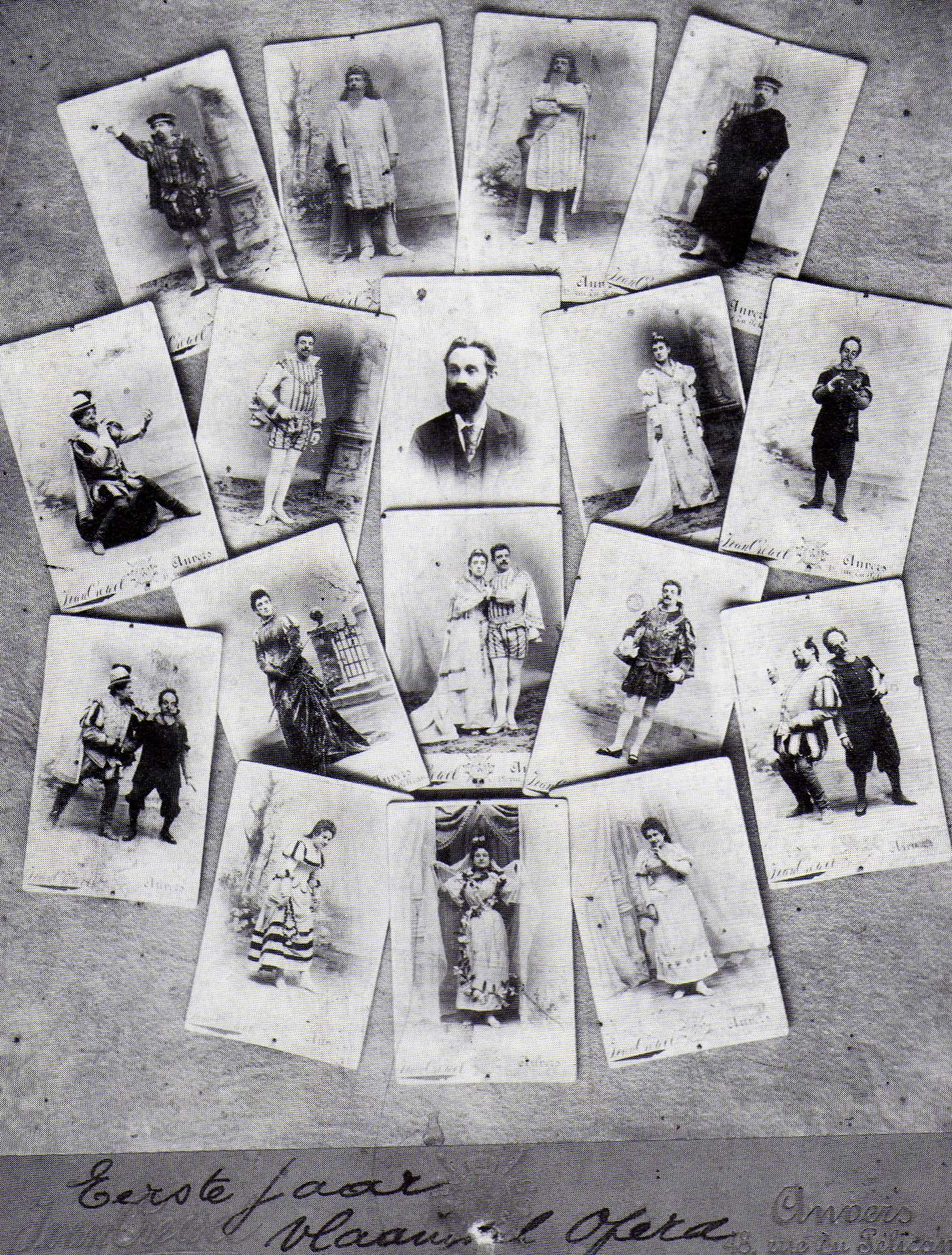 De pioniers van de Vlaamse Opera op een foto uit 1894: 1e rij: Henri Fontaine; 2e rij, v.l.n.r.: Fé Derickx, Karel Berckmans, Edward Keurvels, Eugénie Safir en Bernard Tokkie; 3e rij, v.l.n.r.: Derickx en Tokkie, Safir, Safir en Berckmans, Berckmans, Derickx en Tokkie; 4e rij: Maria Levering (opschrift: Eerste Jaar Vlaamse Opera, op een foto van J. van Crewel, een fotograaf uit de Pelikaanstraat 48 in Antwerpen)